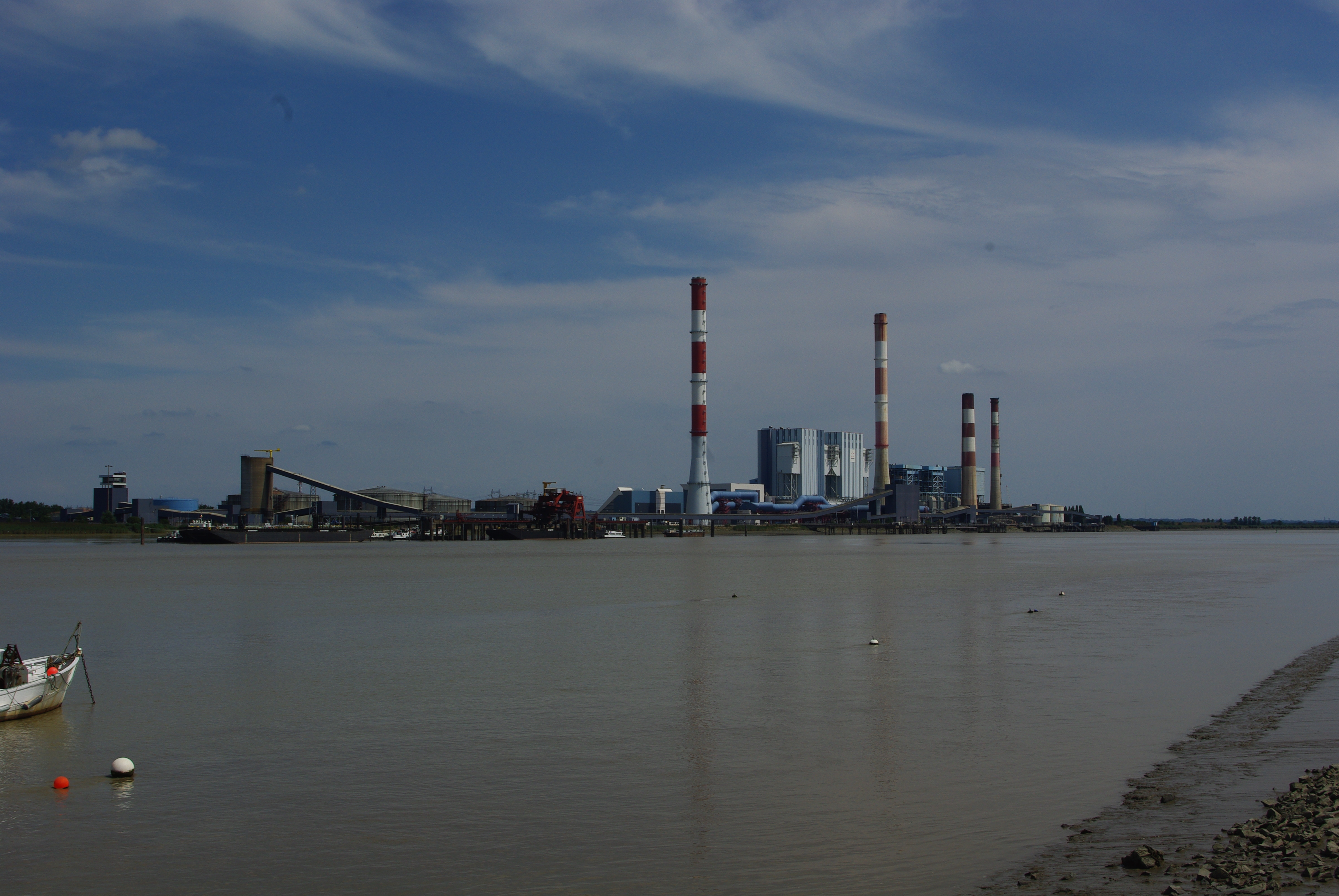 Centrale EDF de Cordemais, Loire-Atlantique, France, vue depuis le Carnet.